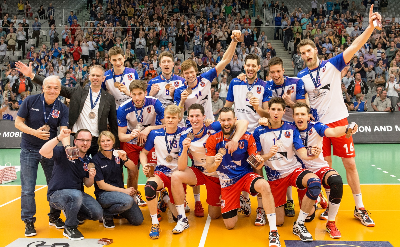 Die Mannschaft bei der Feier des 3. Rangs in der Bundesliga